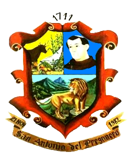 Escudo del municipio Uribante. Estado Táchira. Venezuela